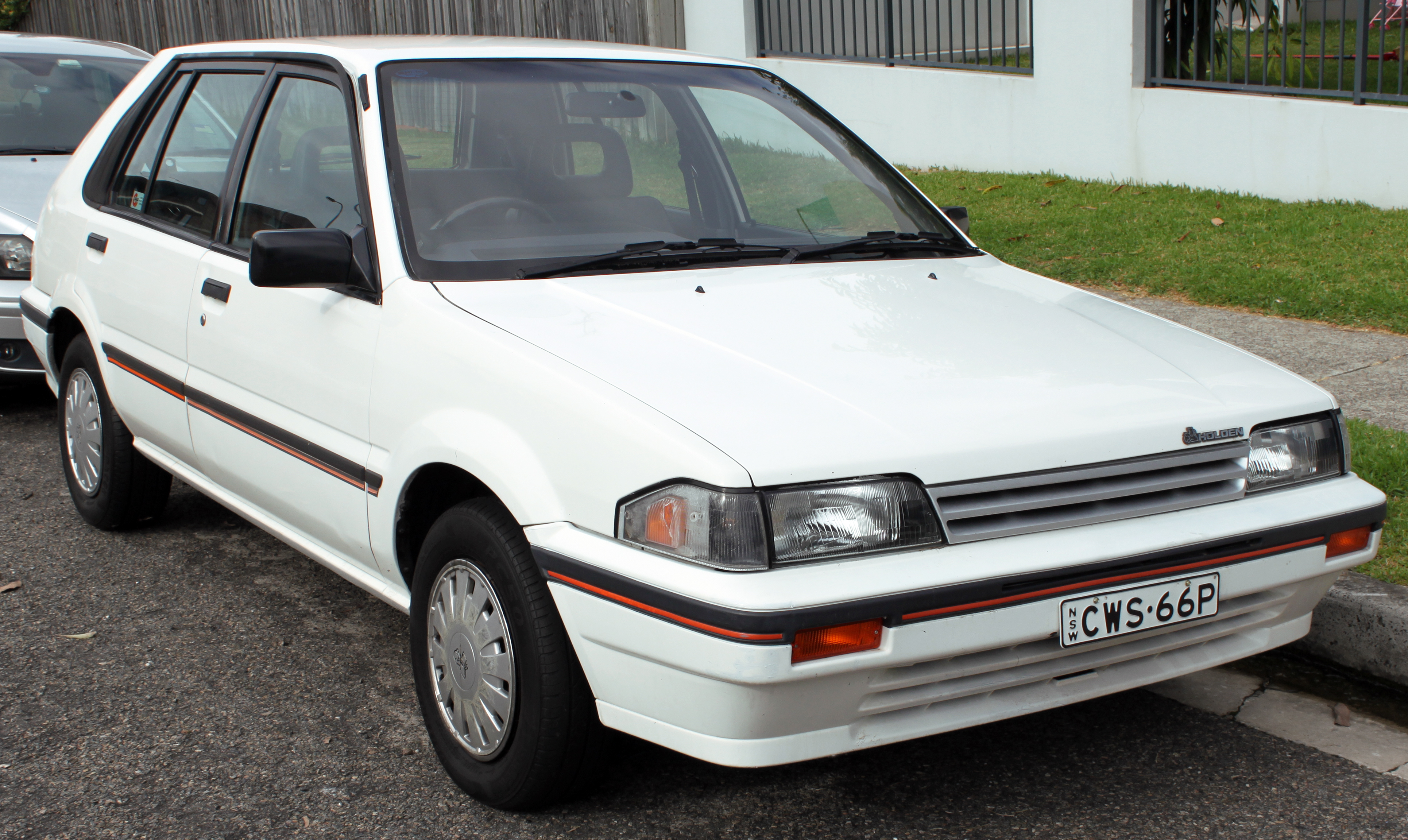 1989 Holden Astra LD SLX